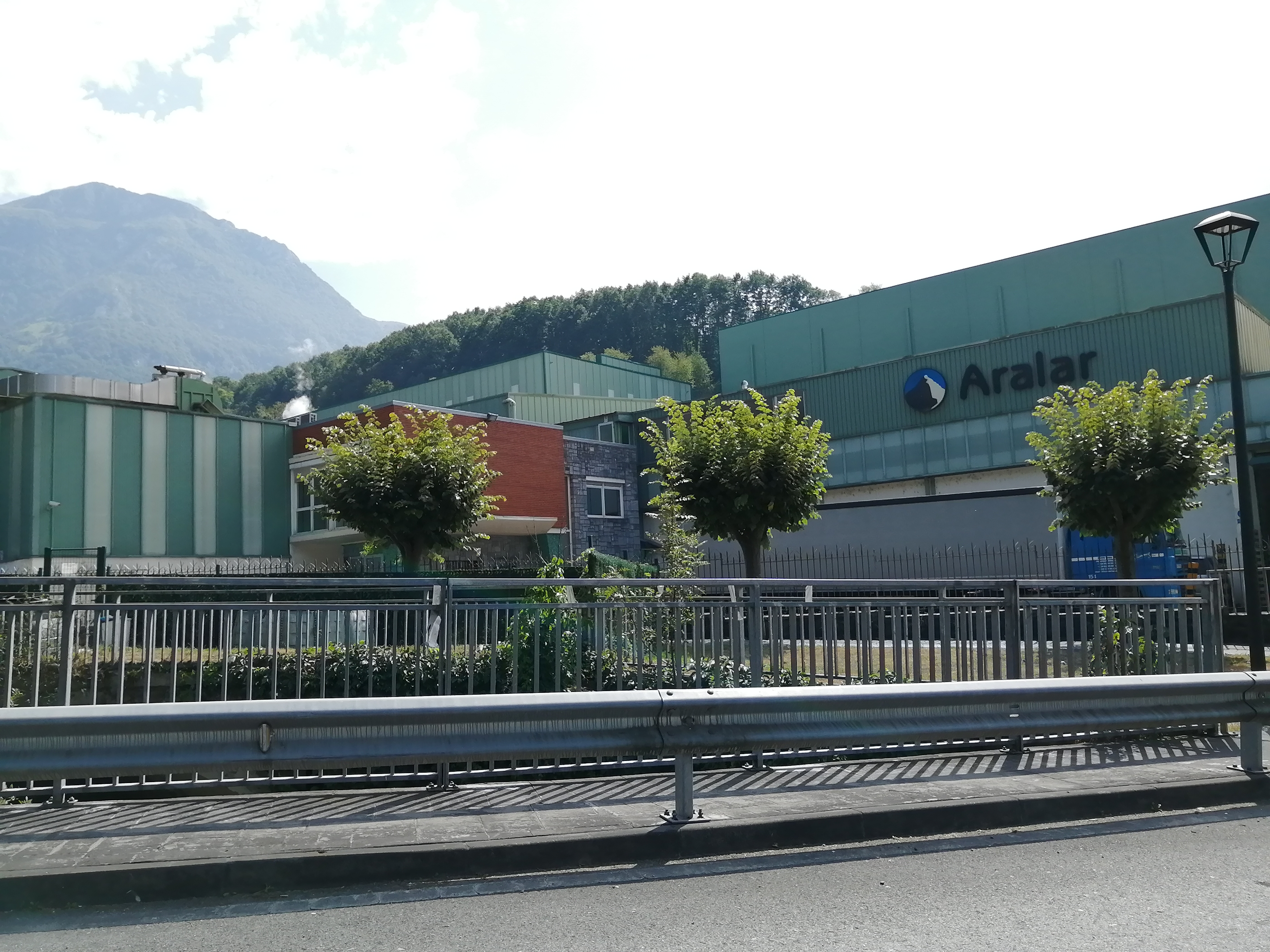 Aralar paper fabrika, Amezketa